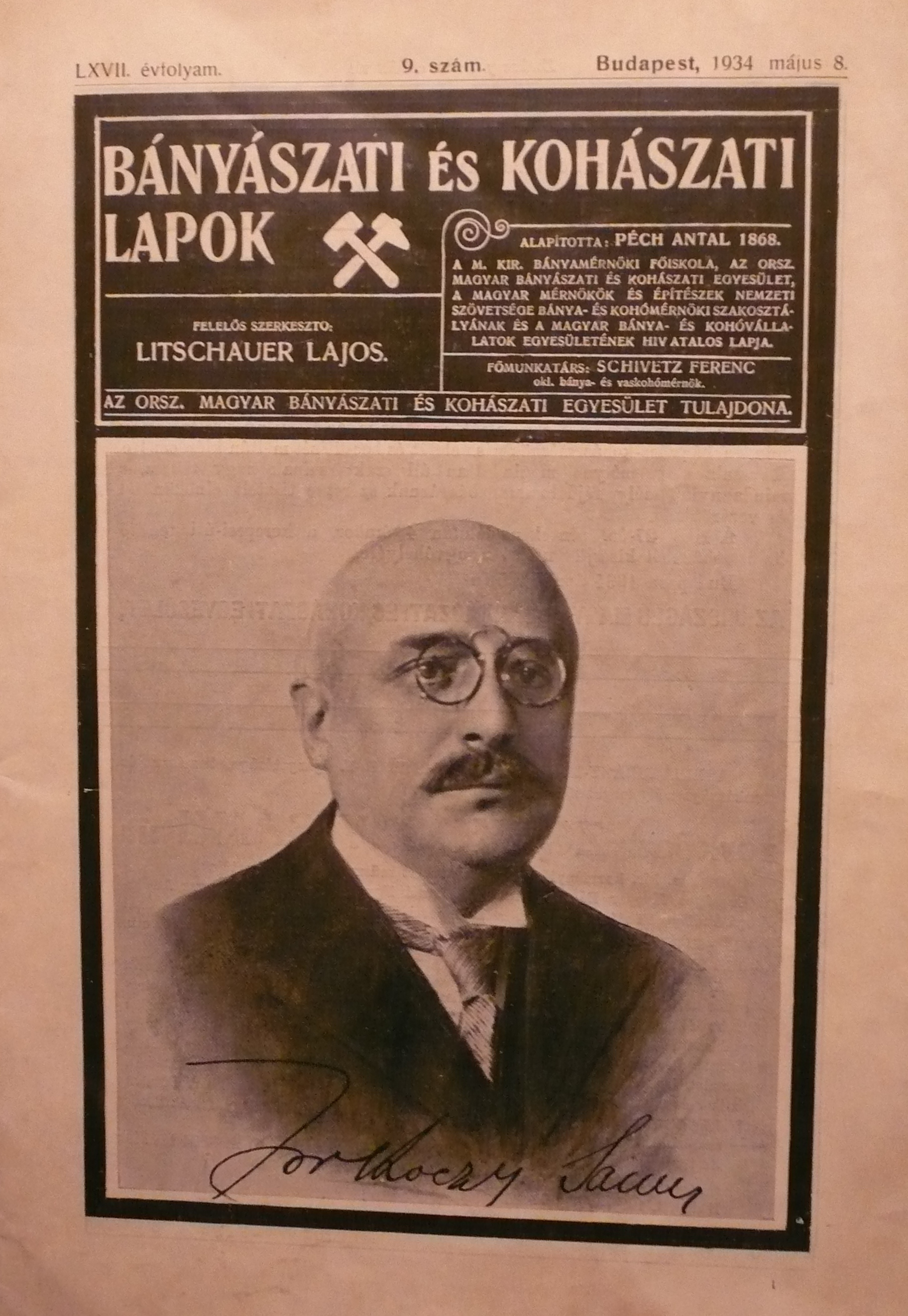 Zorkóczy Samu a Bányászati és Kohászati Lapok címlapján